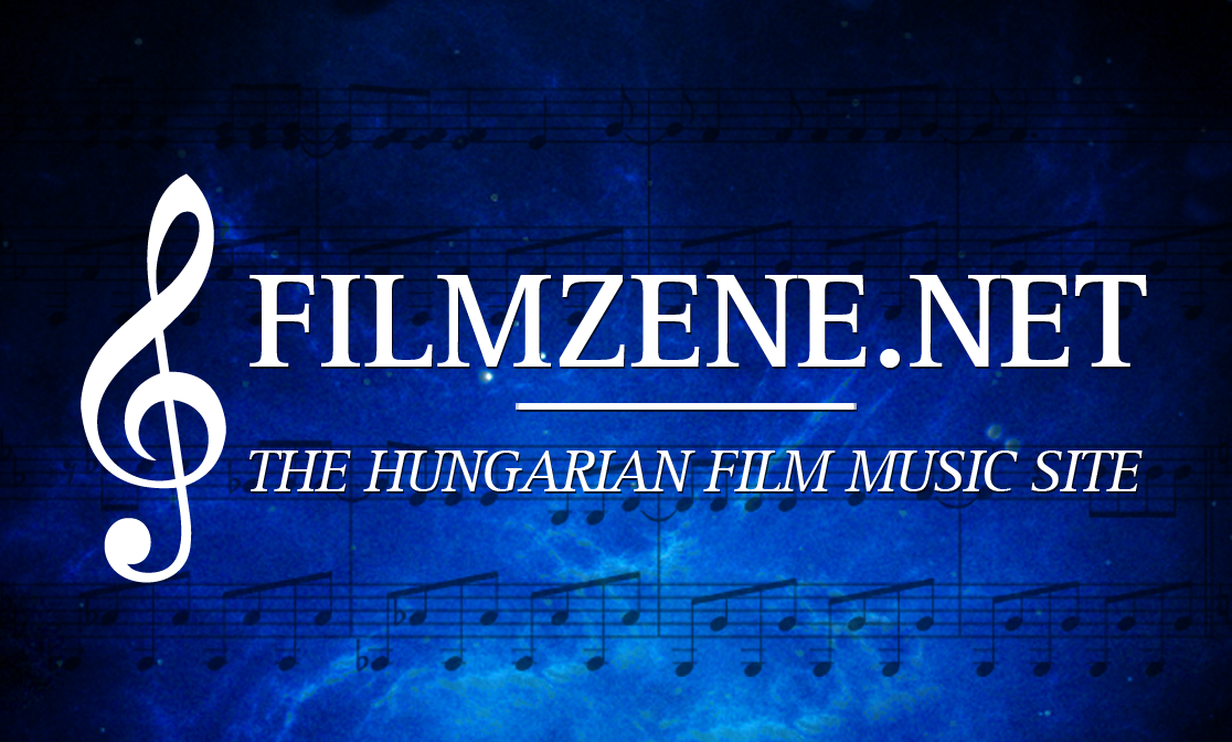 A logója